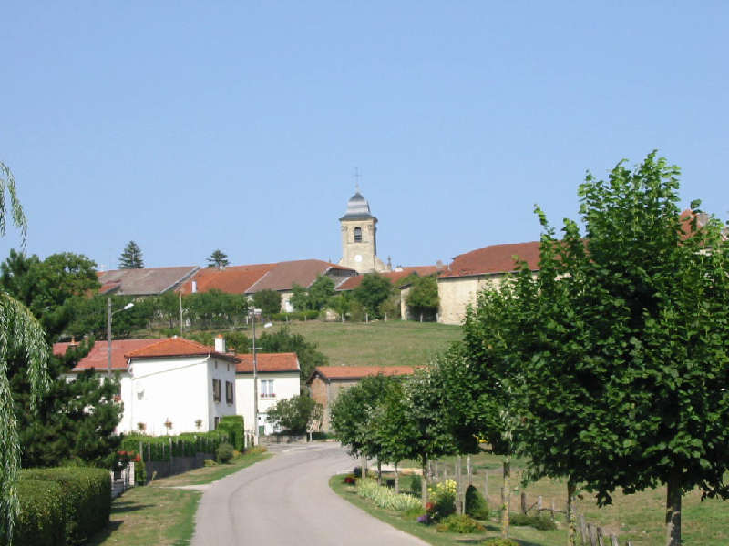 Vue d'ensemble de Parey-sous-Montfort, commune des Vosges